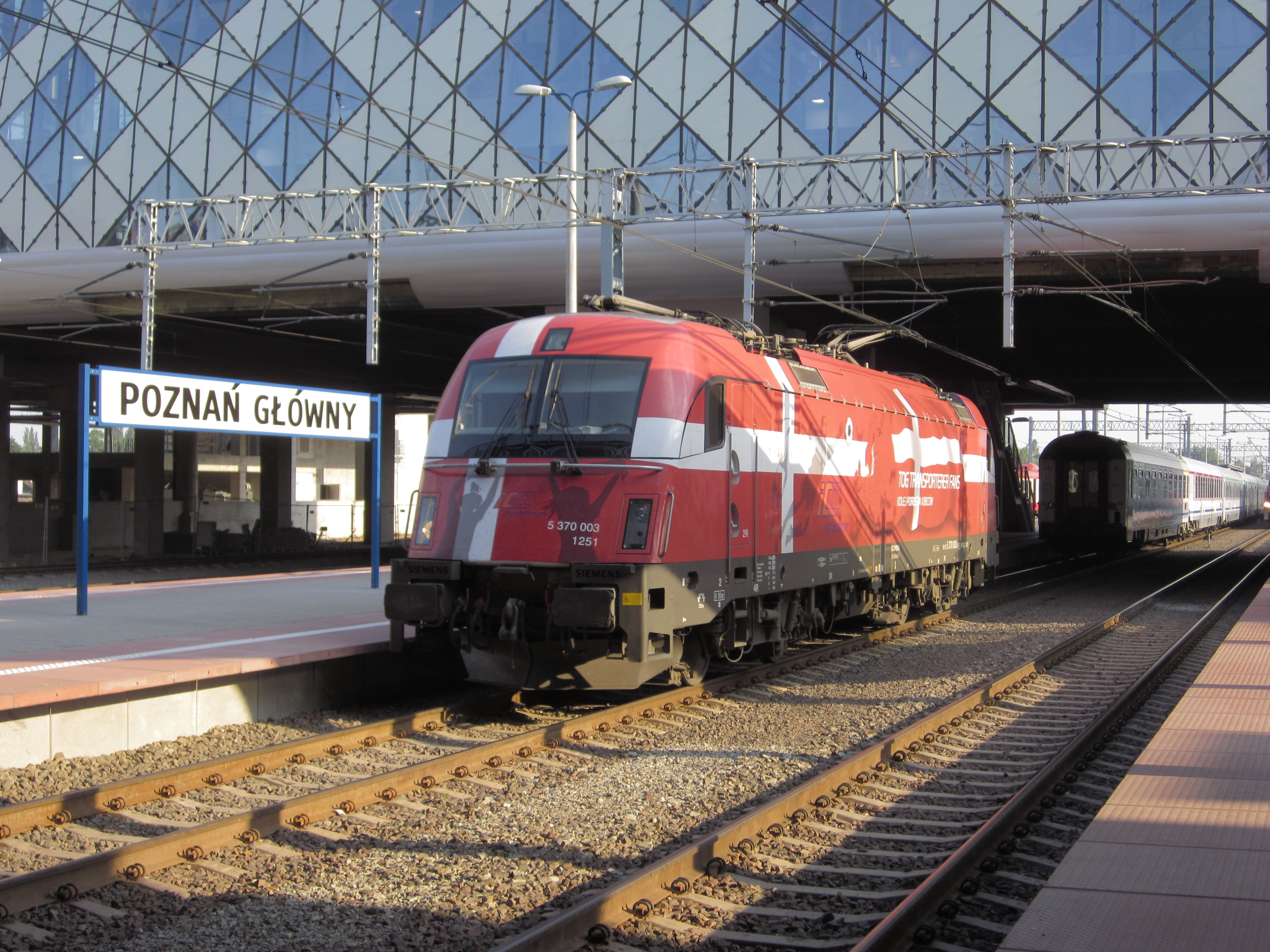 Lokomotywa EU44 oklejona w barwy Danii na czas trwania EURO 2012.